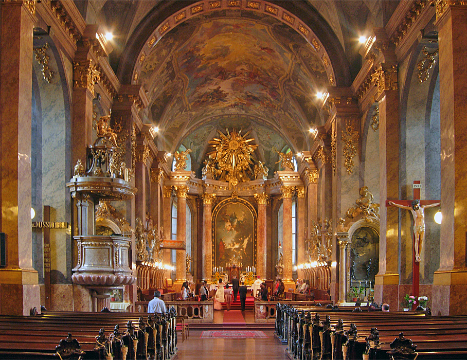 Inneres des Liebfrauendoms in Györ